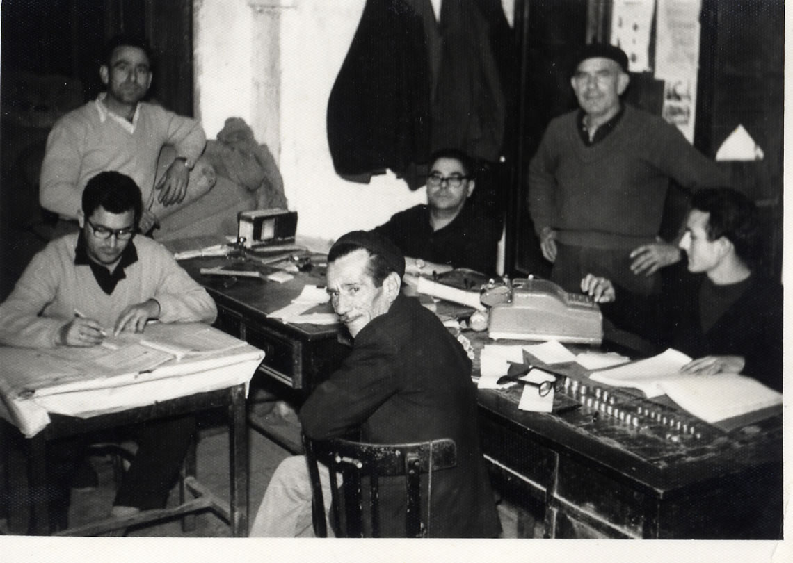 FOTO DE LOS MIEMBROS FUNDADORES DE LA COOPERATIVA CASI EN SUS COMIENZOS